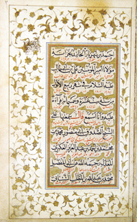 Sahifa Sajjadiyya